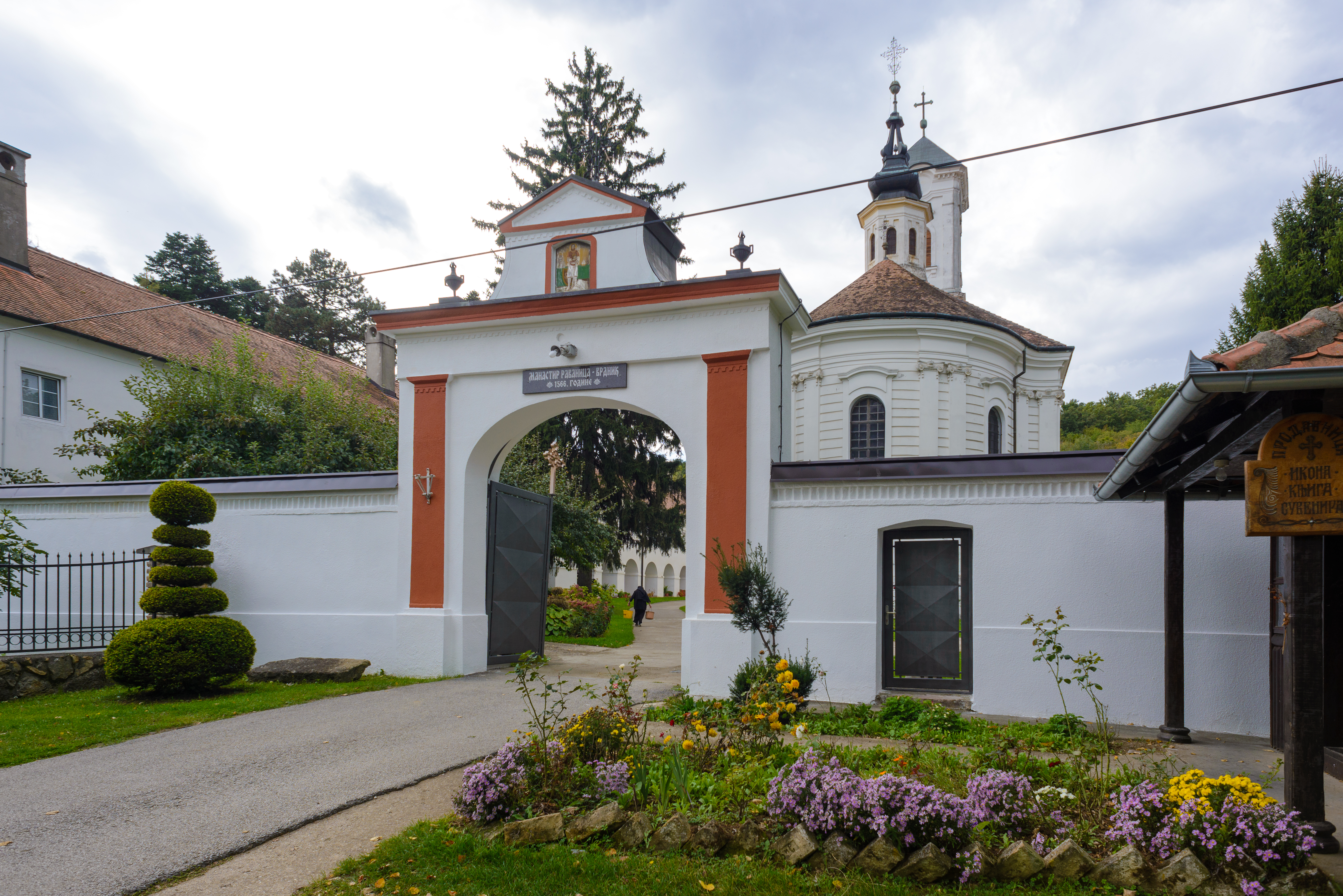 Manastir Vrdnik